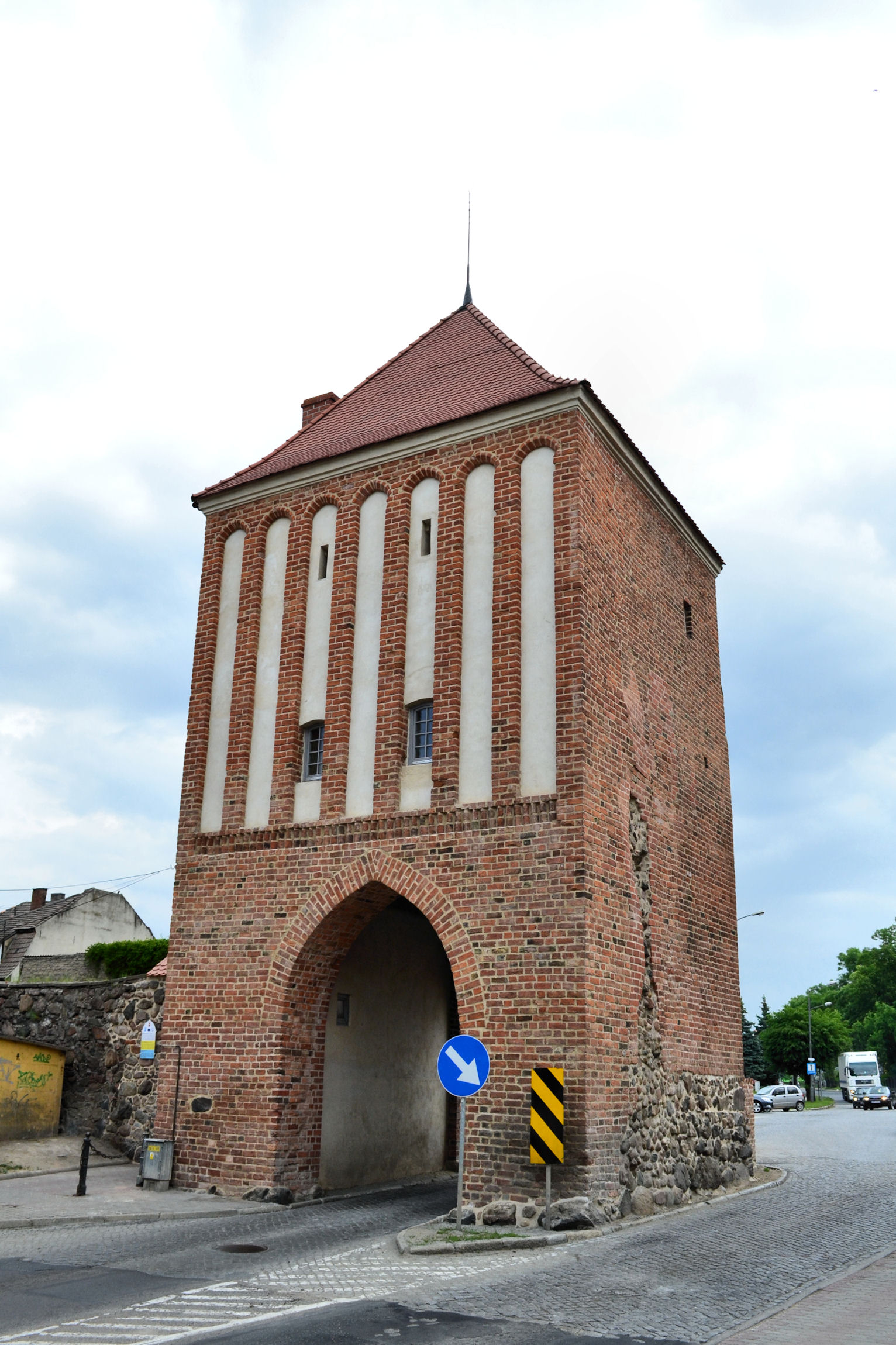 Myślibórz - Brama Nowogródzka